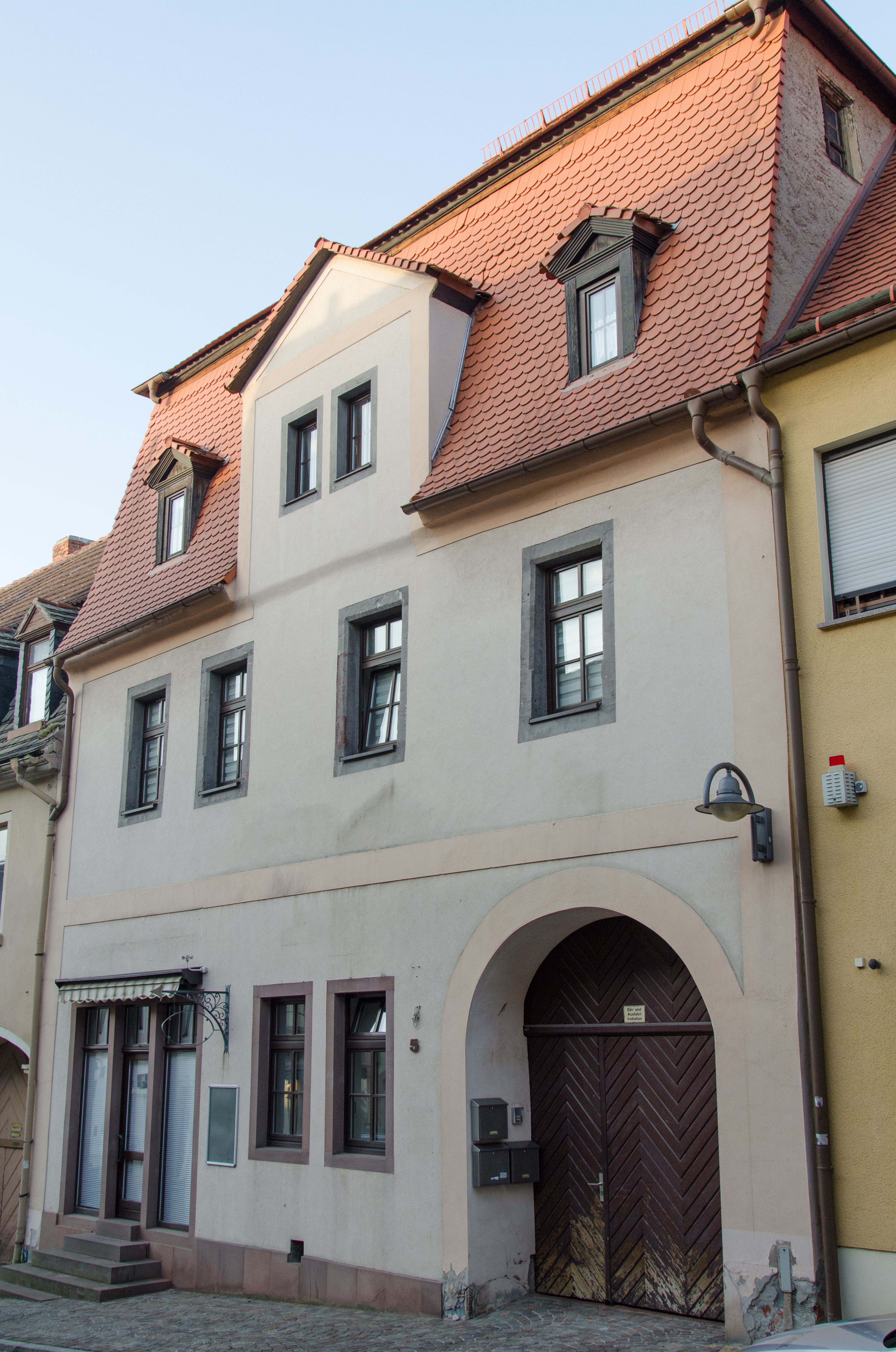 Querfurt, Nebraer Straße 5